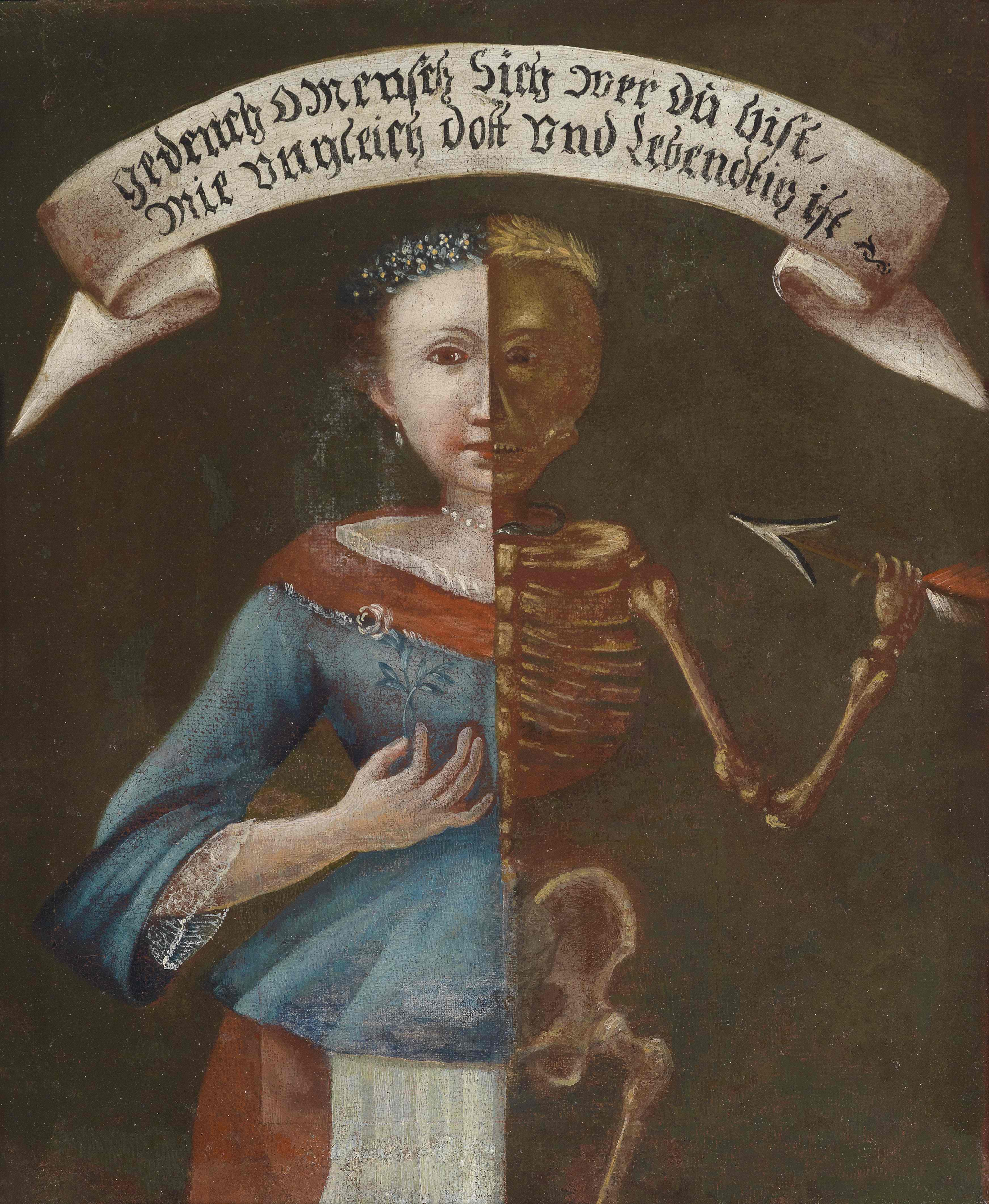 Memento Mori. Das Spruchband über der Figur sagt: Gedenck Mensch sich wer Du bist/Wie ungleich Dott und Lebendig ist Süddeutsche Schule des 18. Jahrhunderts, Öl auf Leinwand, 46 x 38,2 cm